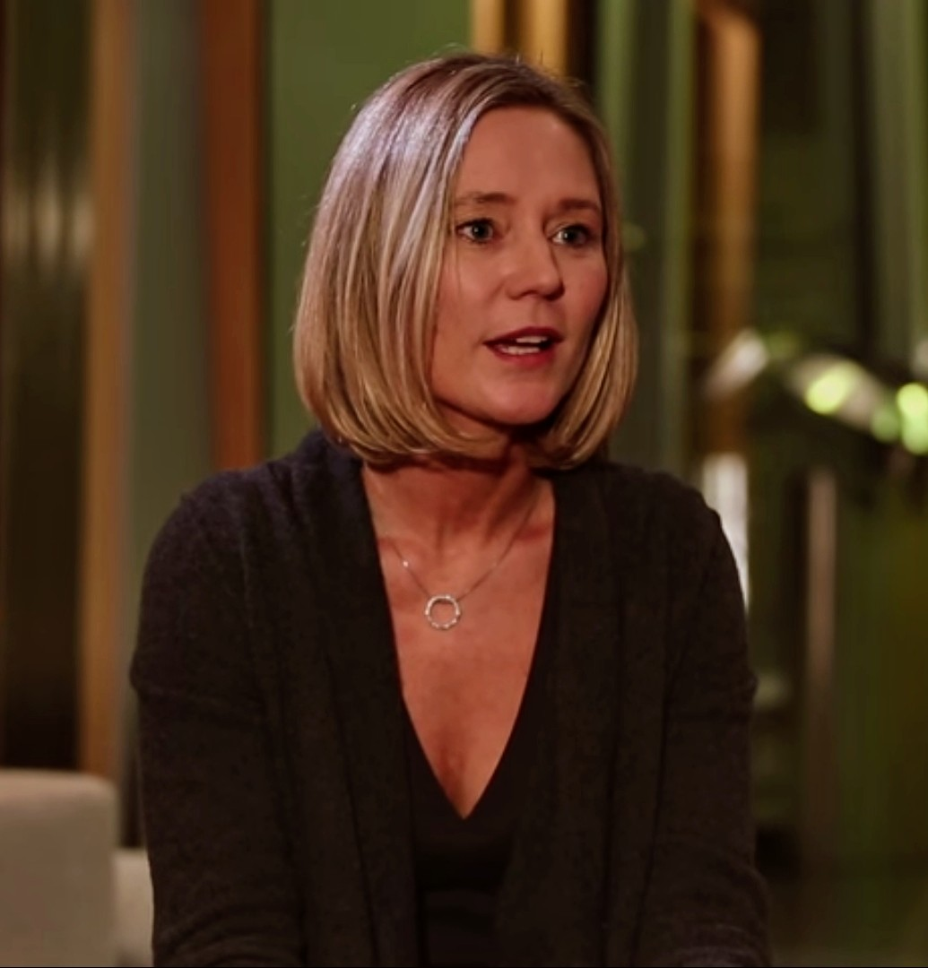 Studierende frühzeitig mit Forschungsaufgaben zu betrauen, ist in allen Disziplinen möglich - und lohnt sich. Das meint Daniela Elsner, Direktorin des Instituts für England- und Amerikastudien an der Goethe-Universität Frankfurt am Main. Für ihr Lehrkonzept hat sie den Ars legendi-Preis für exzellente Hochschullehre 2014 vom Stifterverband und von der Hochschulrektorenkonferenz erhalten. Im Video erzählt sie, wie Forschenden Lernen in der Praxis funktioniert. Und wo es bei der Anerkennung der Lehrenden noch hapert. Weitere Videos zum Thema: Martin Blum: Humboldt reloaded - Forschen im Bachelor-Studium Arshad Ahmad: A New Union of Research and Teaching Jede Woche neu beim Stifterverband: Die Zukunftsmacher und ihre Visionen für Bildung und Ausbildung, Forschung und Technik Produktion: Timur Diehn für den webTV-Kanal des Stifterverbandes